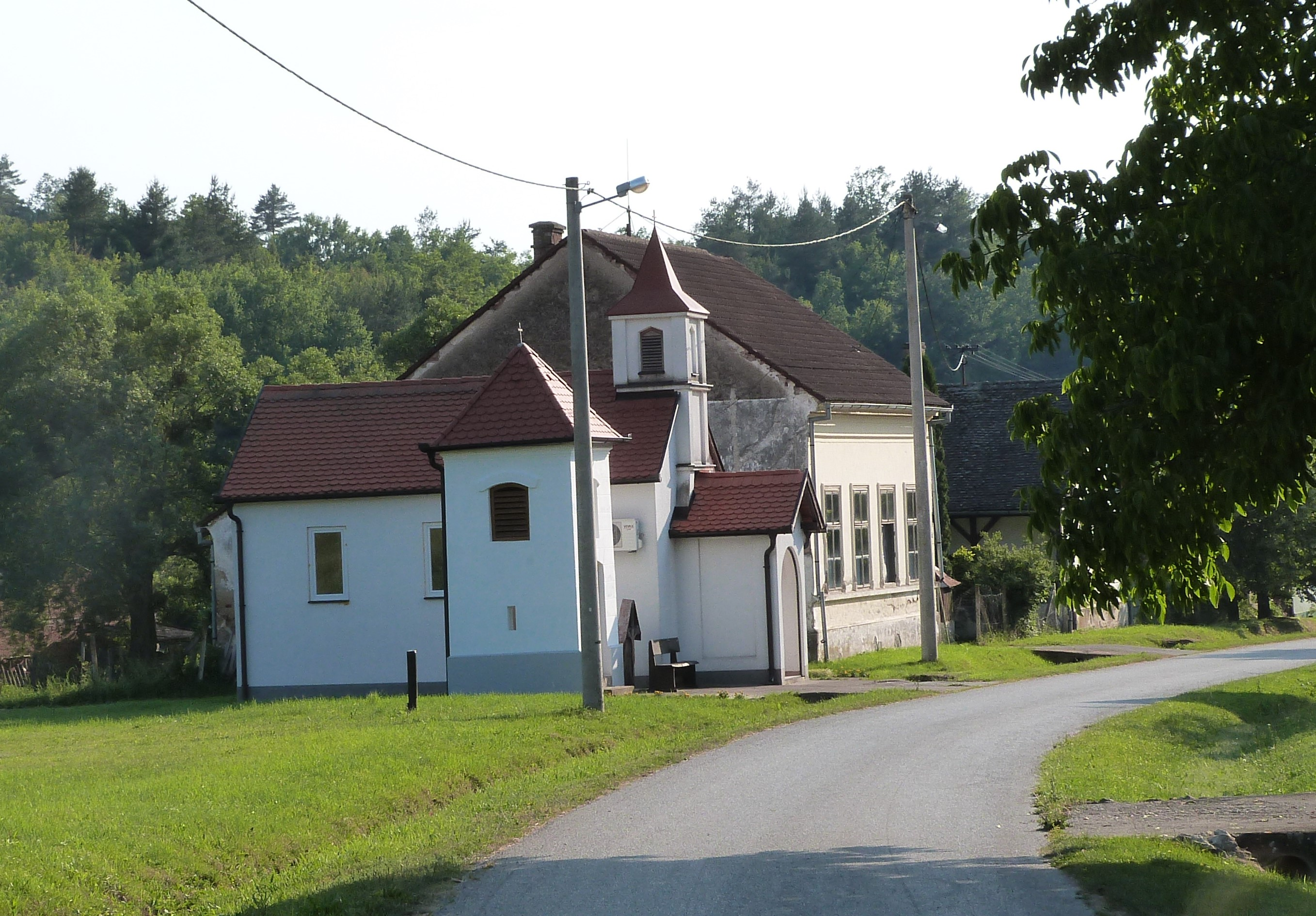 Crkva i stara skola u Lovčićima